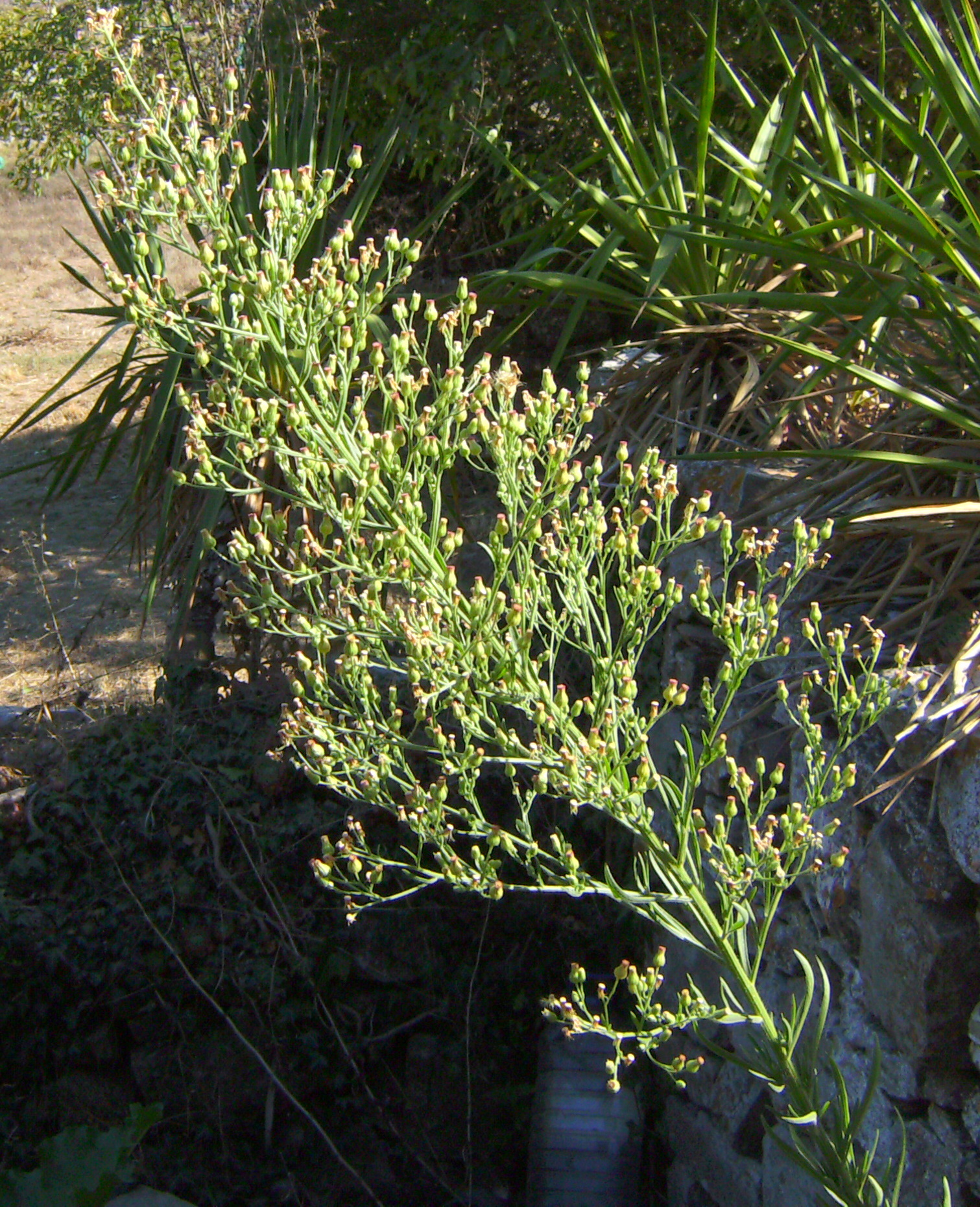 Conyza canadensis a Casteltallat, Bages